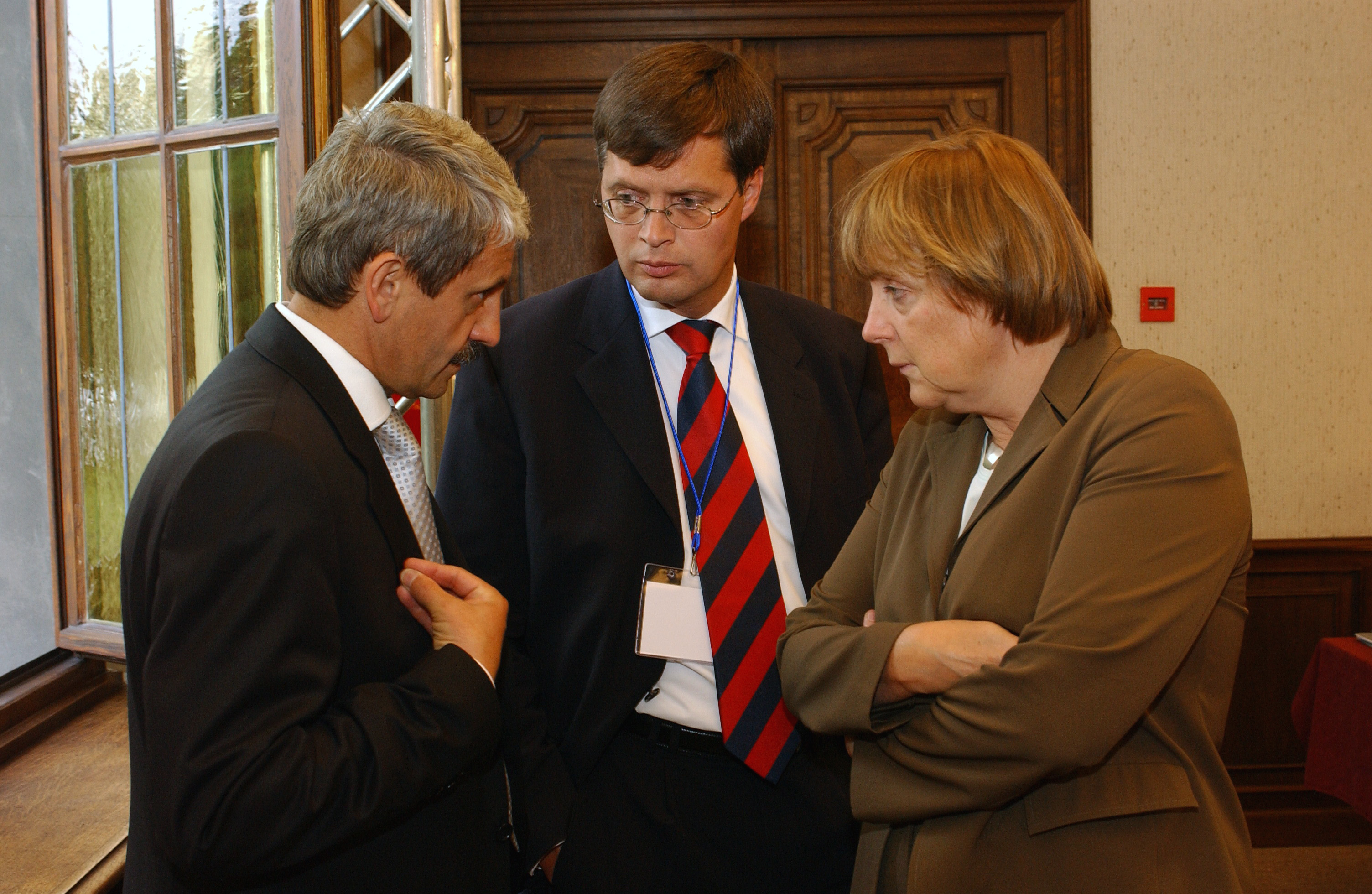 EPP Summit Meise 16-17 June 2004